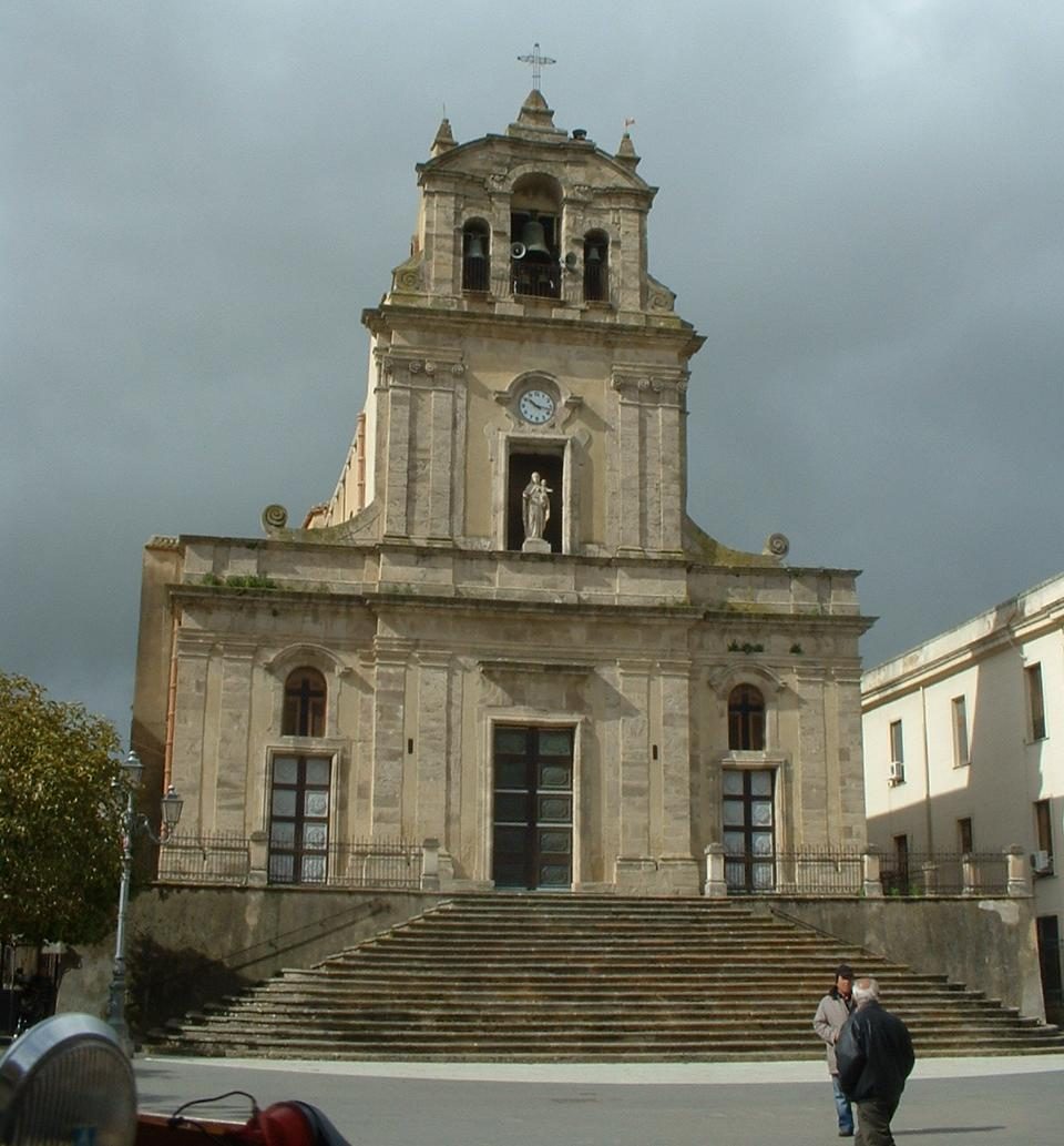 Mirabella Imbaccari (CT), Chiesa di Santa Maria delle Grazie (1637)